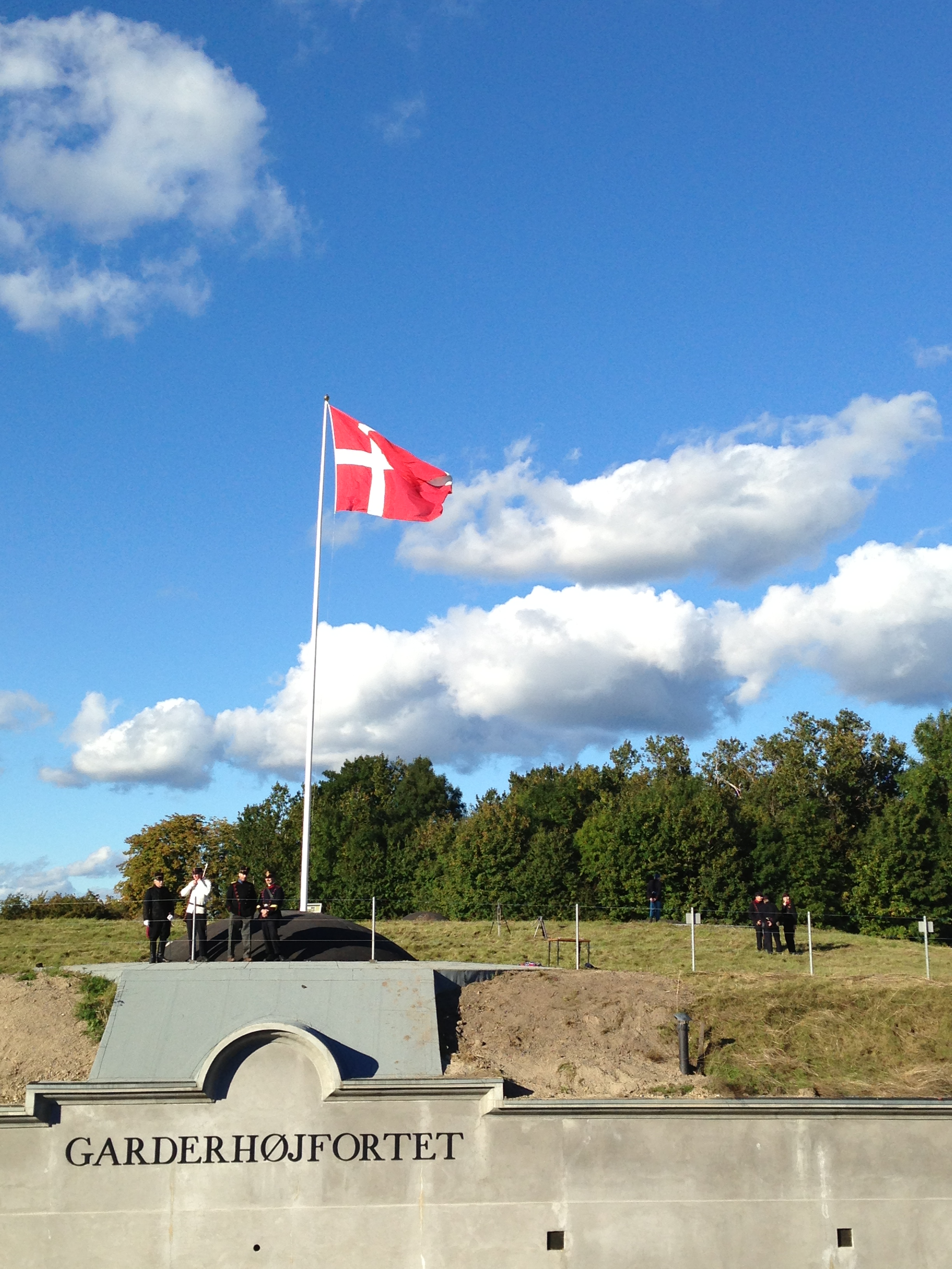 Fortet med 4 soldater og hejst flag.